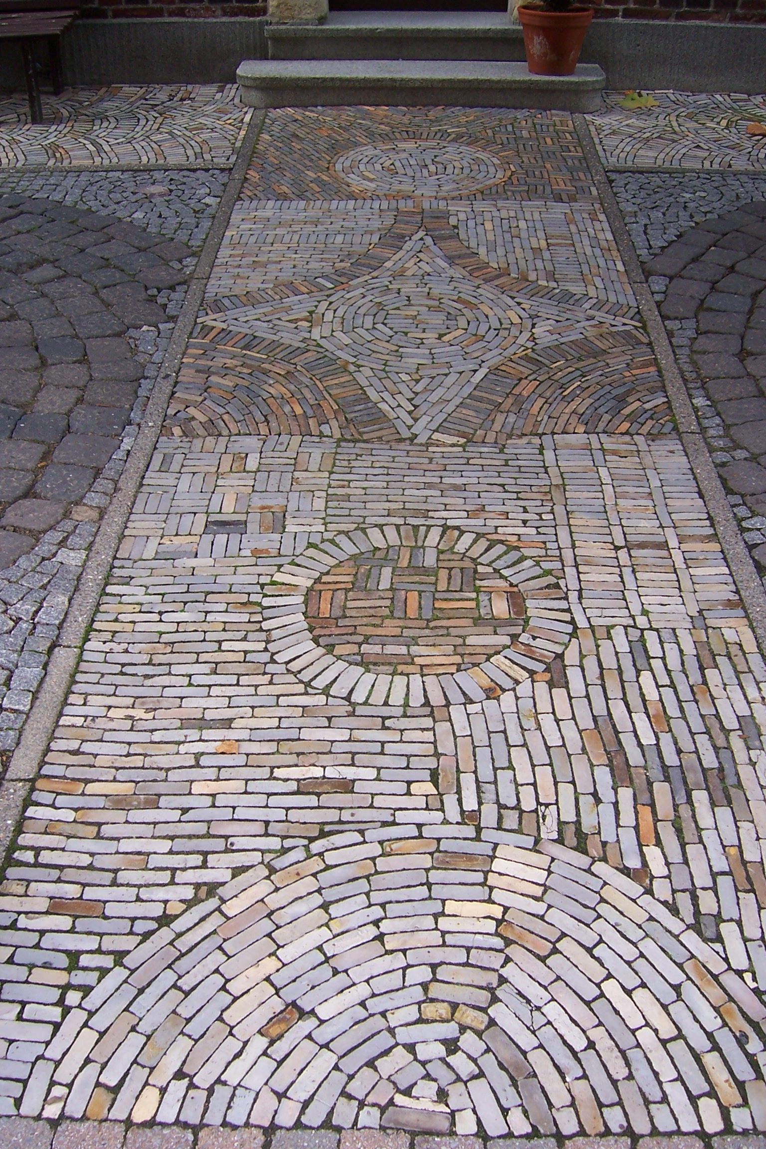 Boden aus Riemchen in Holtwick, Kreis Coesfeld, NRW. Diese Art Riemchen waren (ehem.) Stapelhilfen aus den Töpferstädten Stadtlohn und Vreden, beide Kreis Borken, NRW.